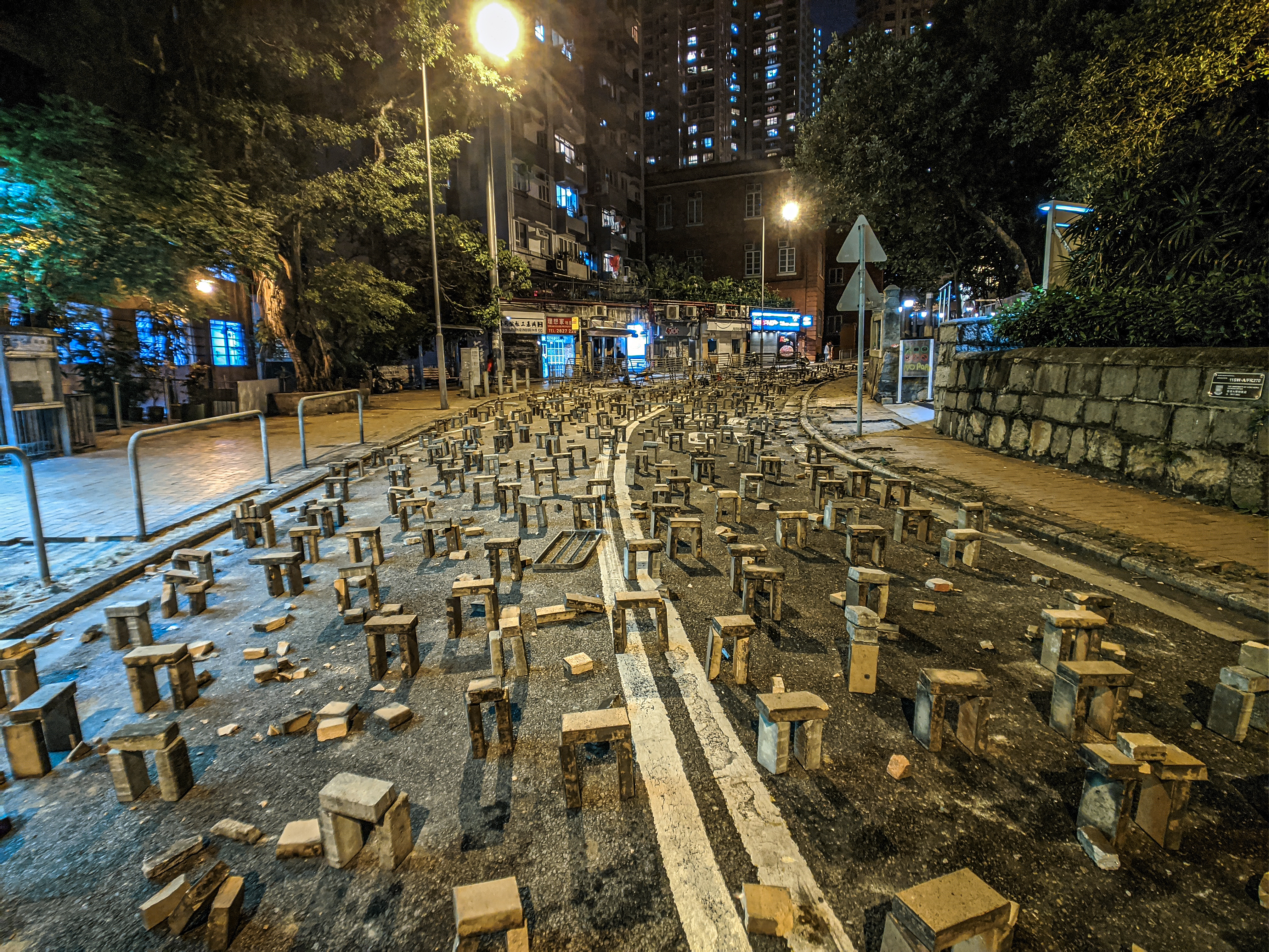 IMG_20191115_185202